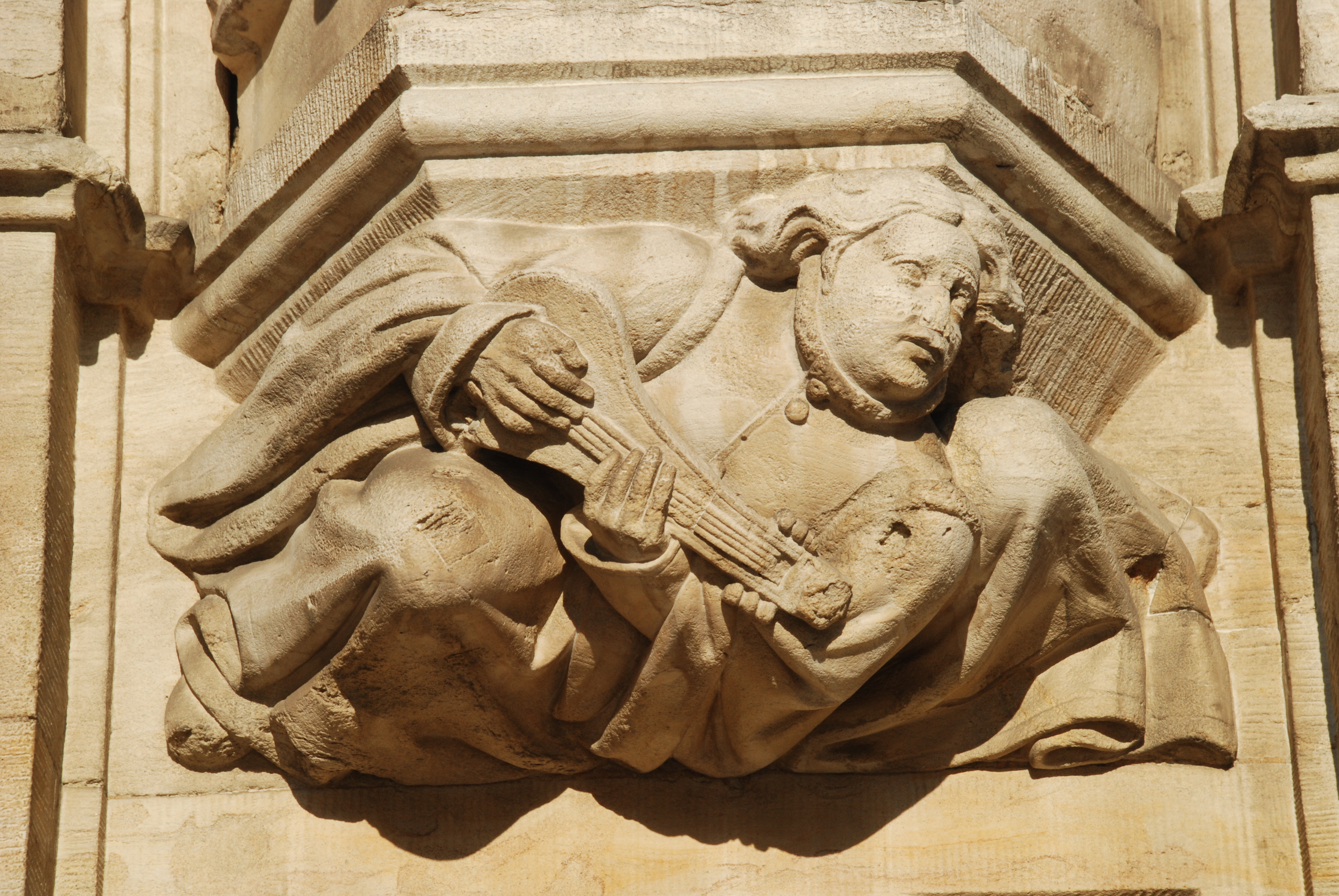 Belgique - Bruxelles - Grand-Place - Hôtel de ville